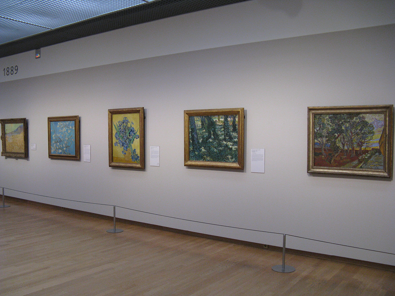 Zicht op een deel van het Van Gogh Museum